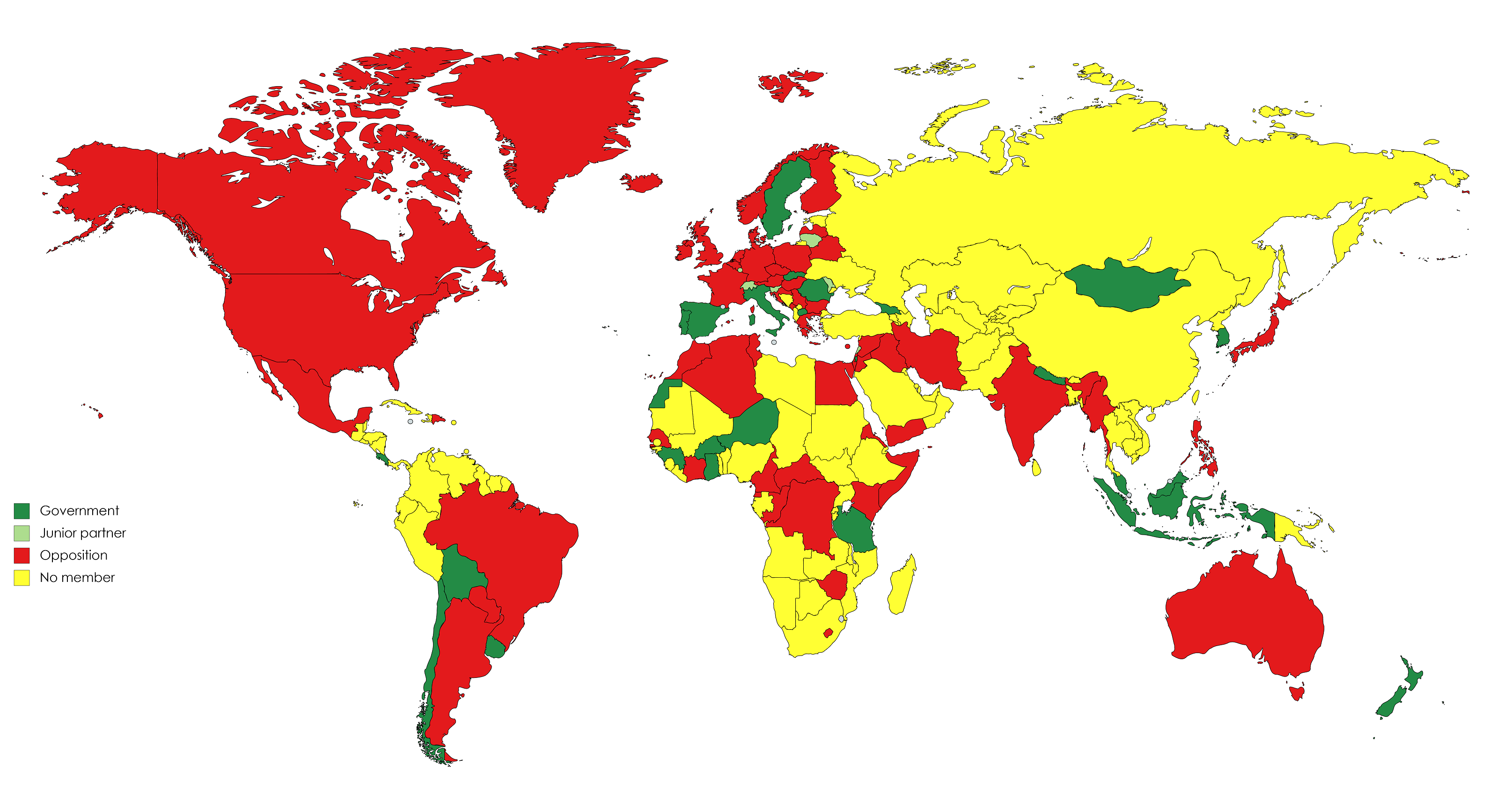 using